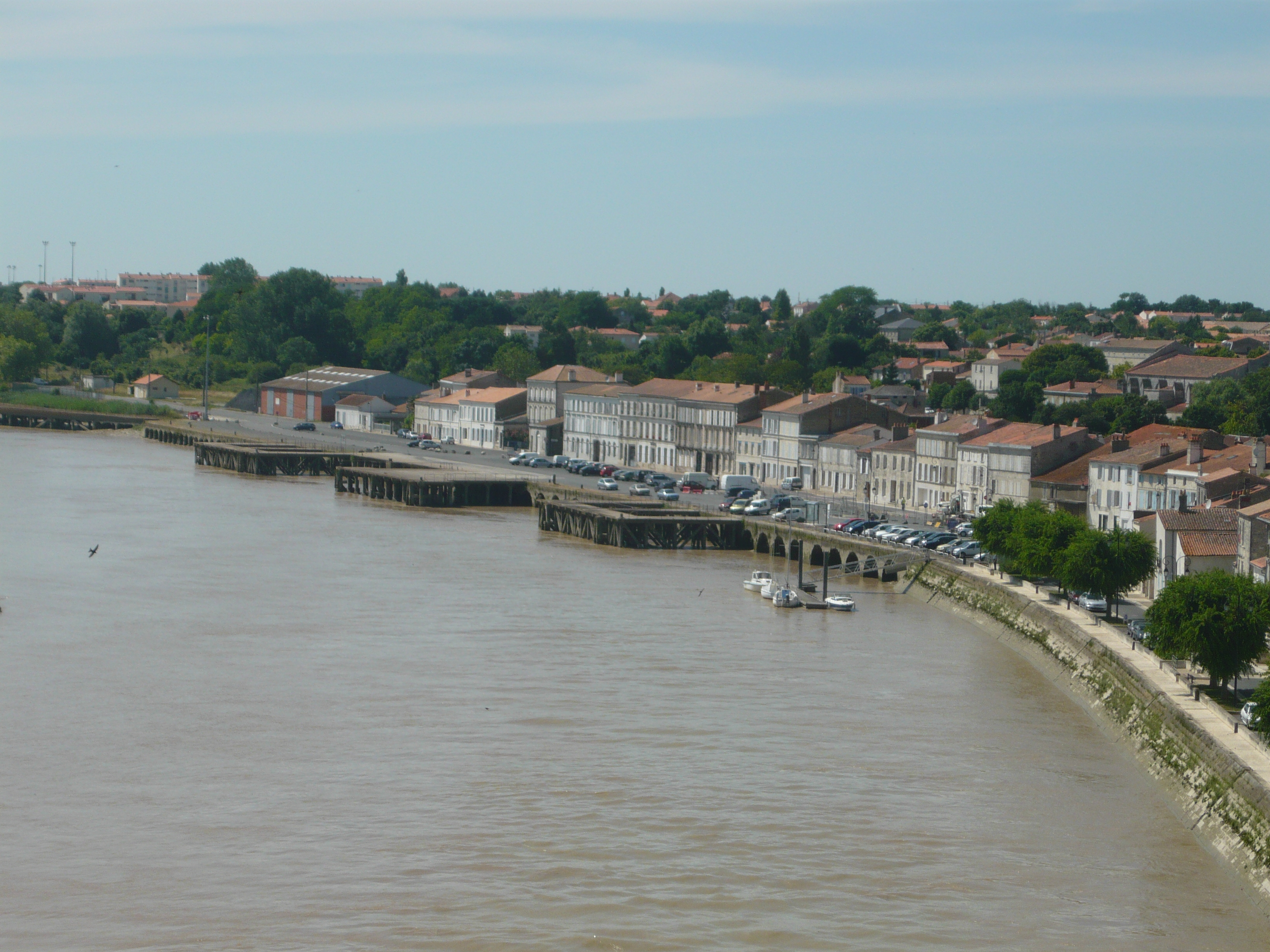 La rive droite à Tonnay-Charente, vue générale sur la ville-centre et son port fluvial prise depuis le pont suspendu (Charente-Maritime).